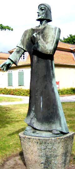 Statur Nathan der Weise, (1961), Erich Schmidtbochum (1913-1999), Modell: Ernst Deutsch (1890-1963), Wolfenbüttel